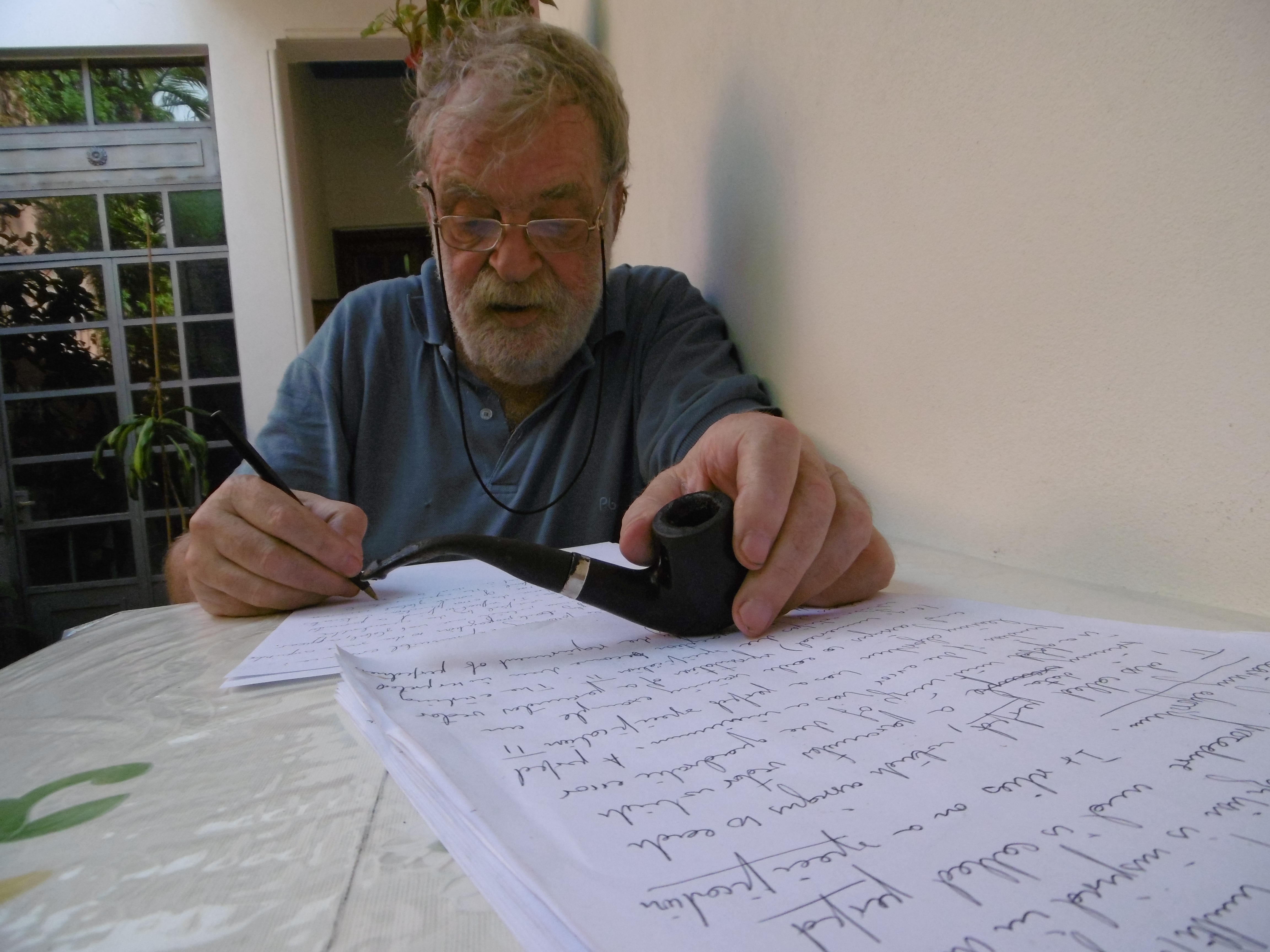 Joos Heintz es un destacado matemático cuyos aportes en álgebra conmutativa y geometría algebraica impulsaron una corriente internacional de investigación en cuestiones de complejidad de cálculo simbólico. En el campo de la computación teórica Heintz fue pionero en el uso de circuitos como estructuras de datos y es reconocido como una autoridad en técnicas de cotas inferiores de complejidad para la evaluación de polinomios.